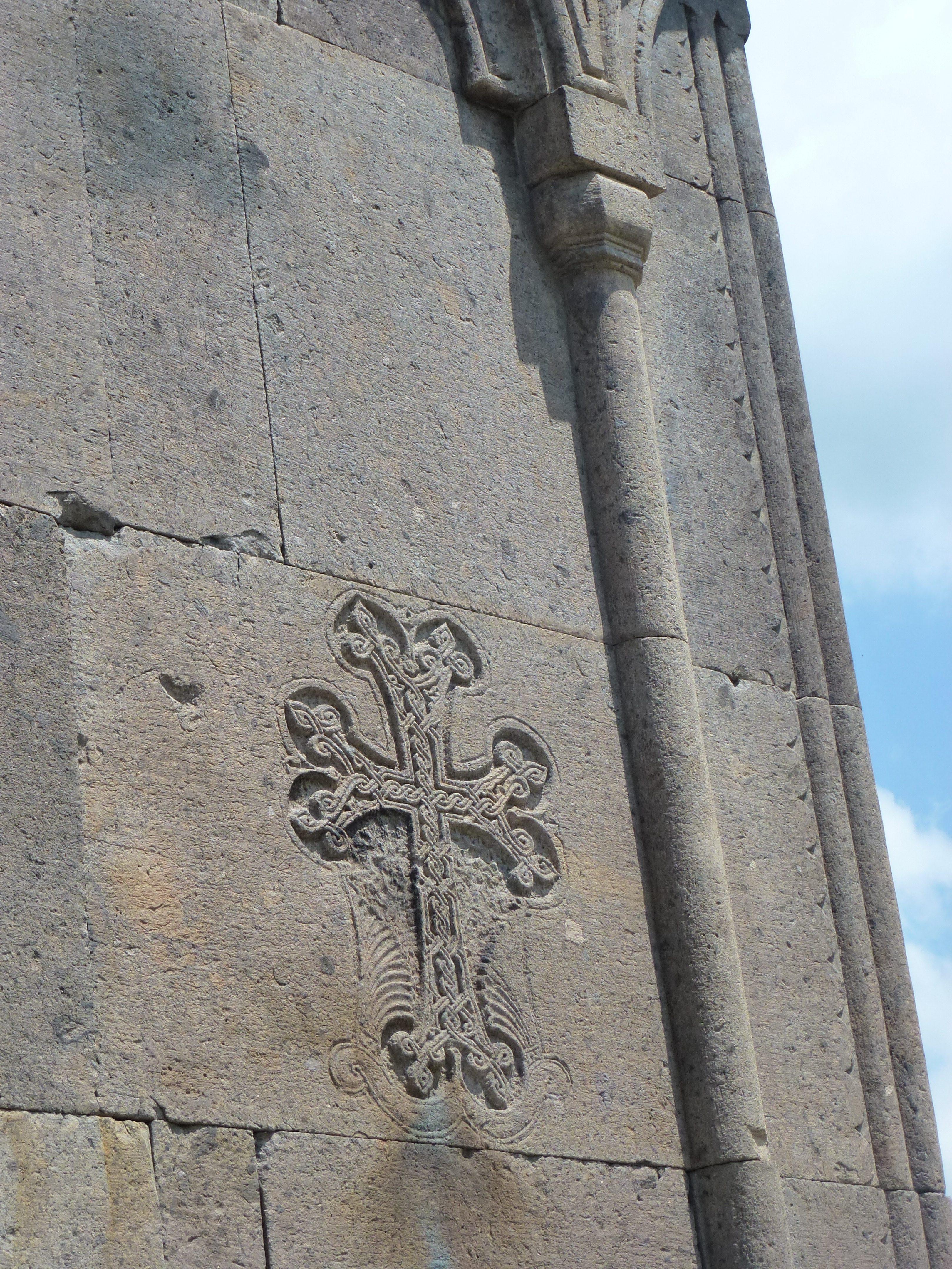 Գոշավանաք համալիր, Գոշ, Հայաստան 23/14